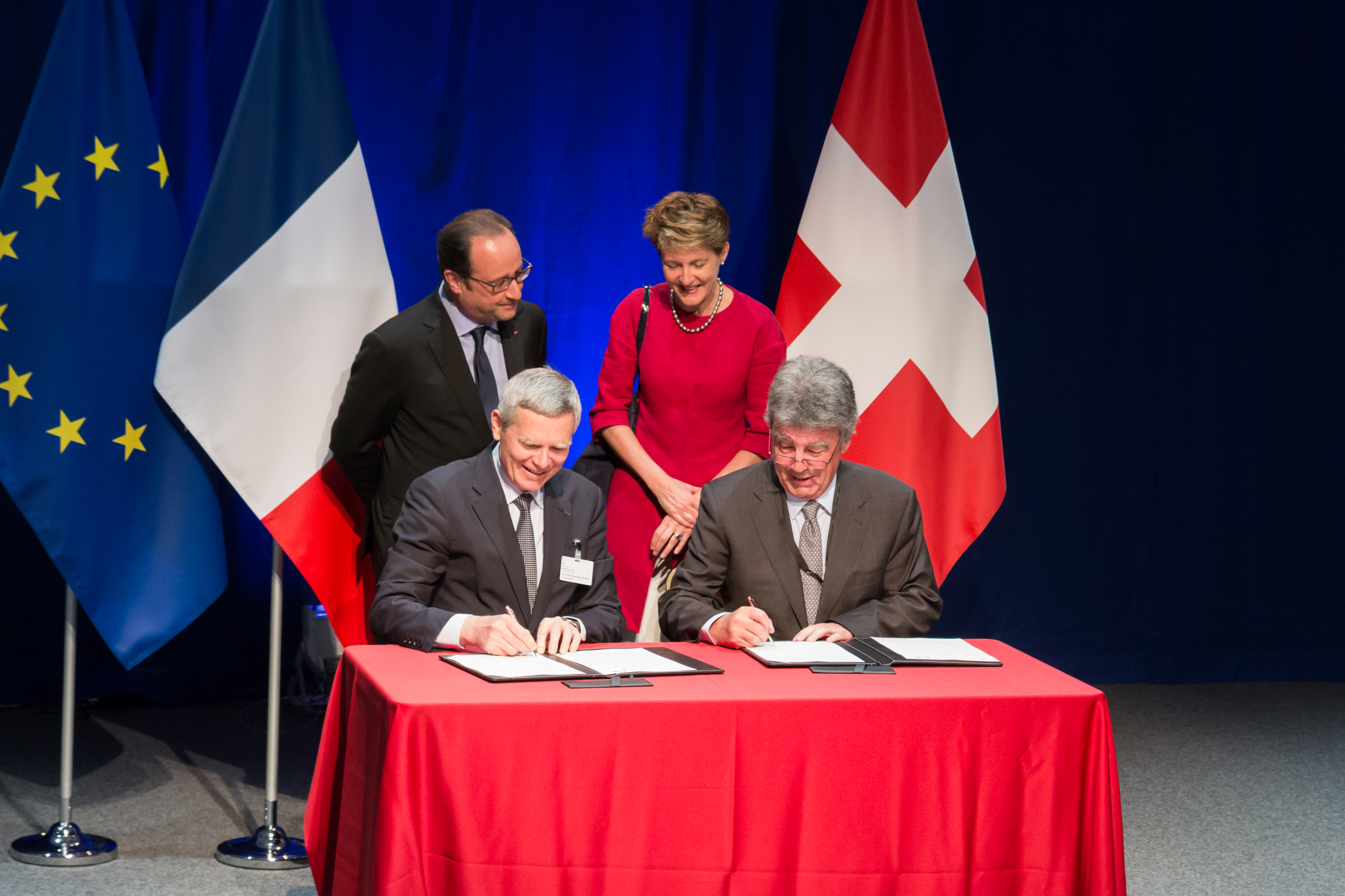 Signature d'un accord entre L'Ecole polytechnique et l'EPFL L’École polytechnique (l’X) et l’École Polytechnique Fédérale de Lausanne (l’EPFL) ont signé aujourd’hui un accord en vue de renforcer leur coopération dans les domaines de l’enseignement, de la recherche, de l’entrepreneuriat et de l’innovation. Cet accord a été signé en présence de la Présidente de la Confédération suisse, Simonetta Sommaruga, et du Président de la République française, François Hollande.